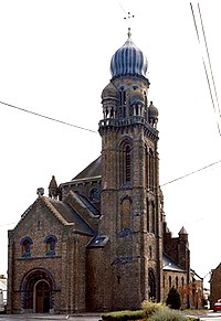 vue de l'église